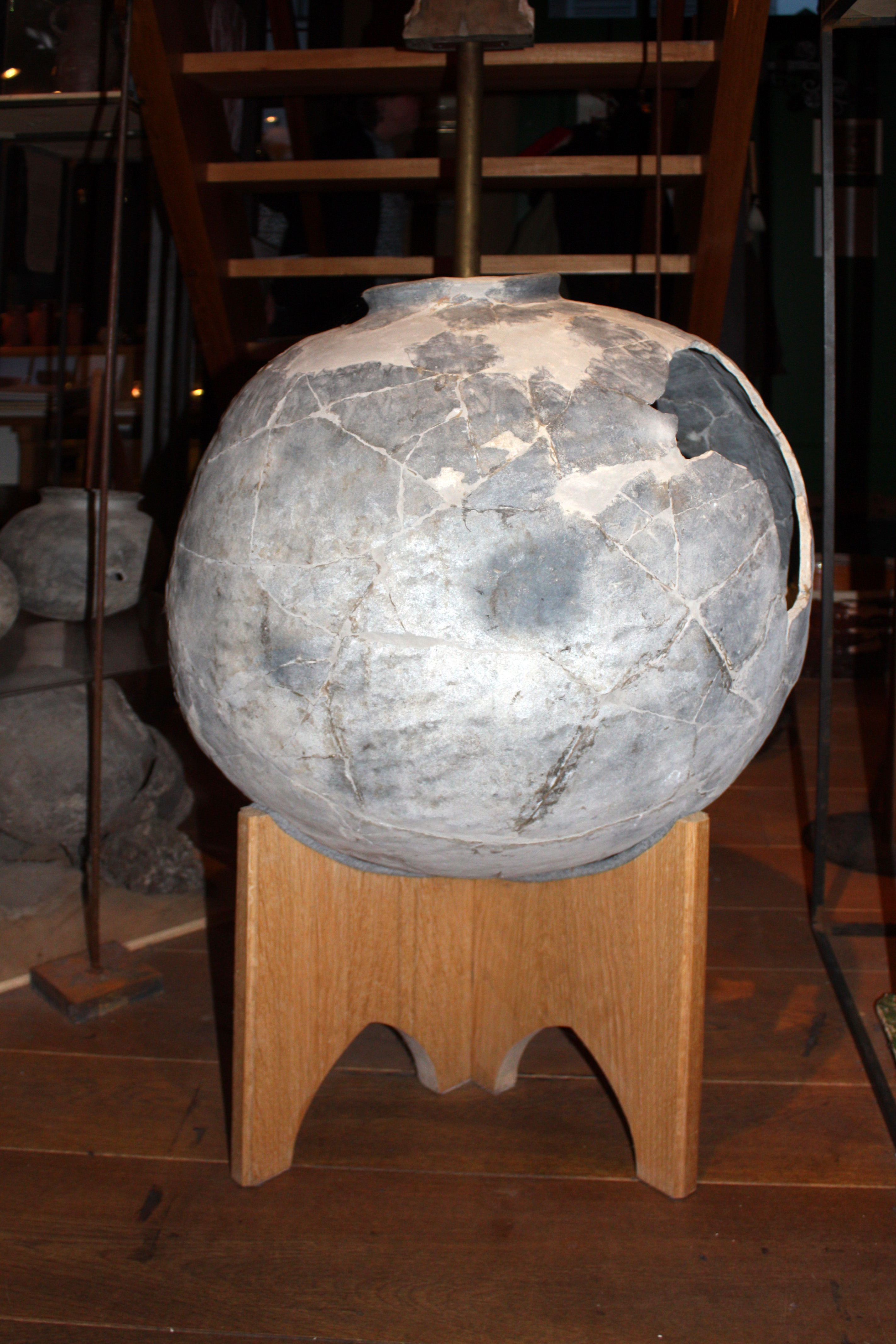 Brühler Keramikmuseum, Vorrats- oder Trantsportgefäß aus der Badorfer Produktion